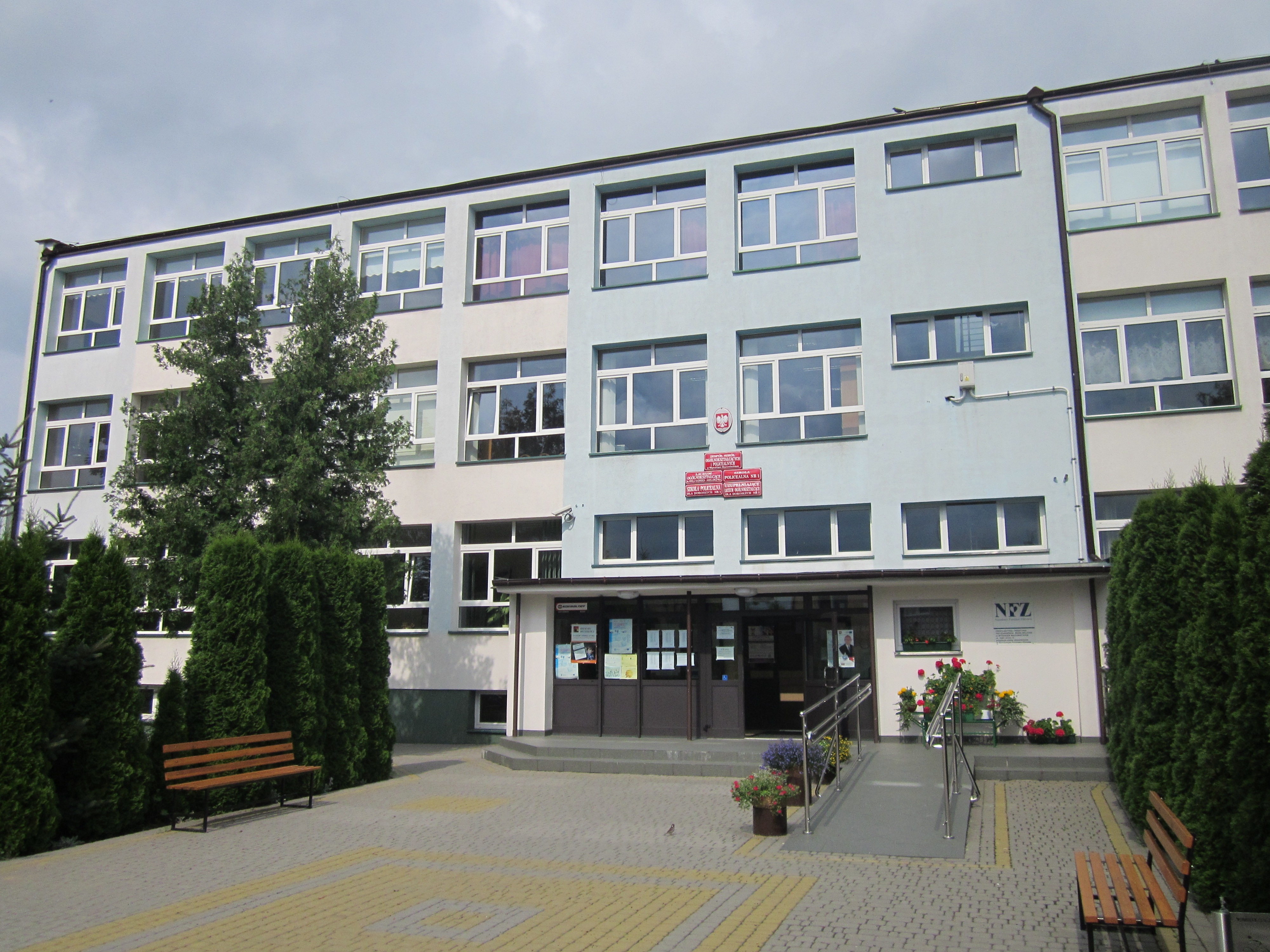 Budynek ten znajduje się przy ul. 1000-lecia 15. Szkoła powstała we wrześniu 1945 r.